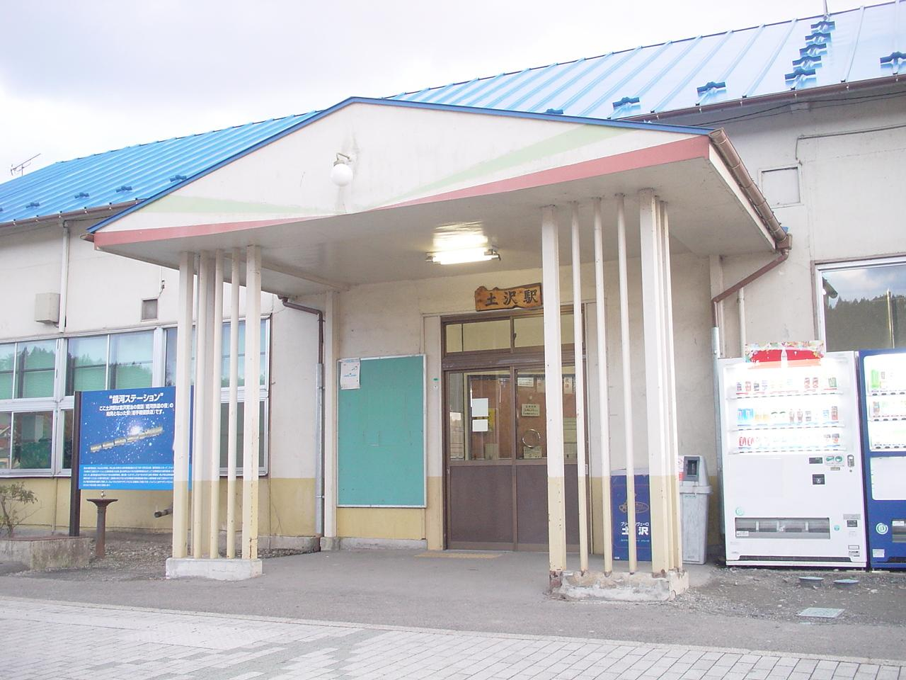 （土沢駅）